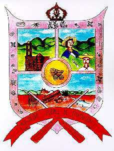 Escudo de Huajicori